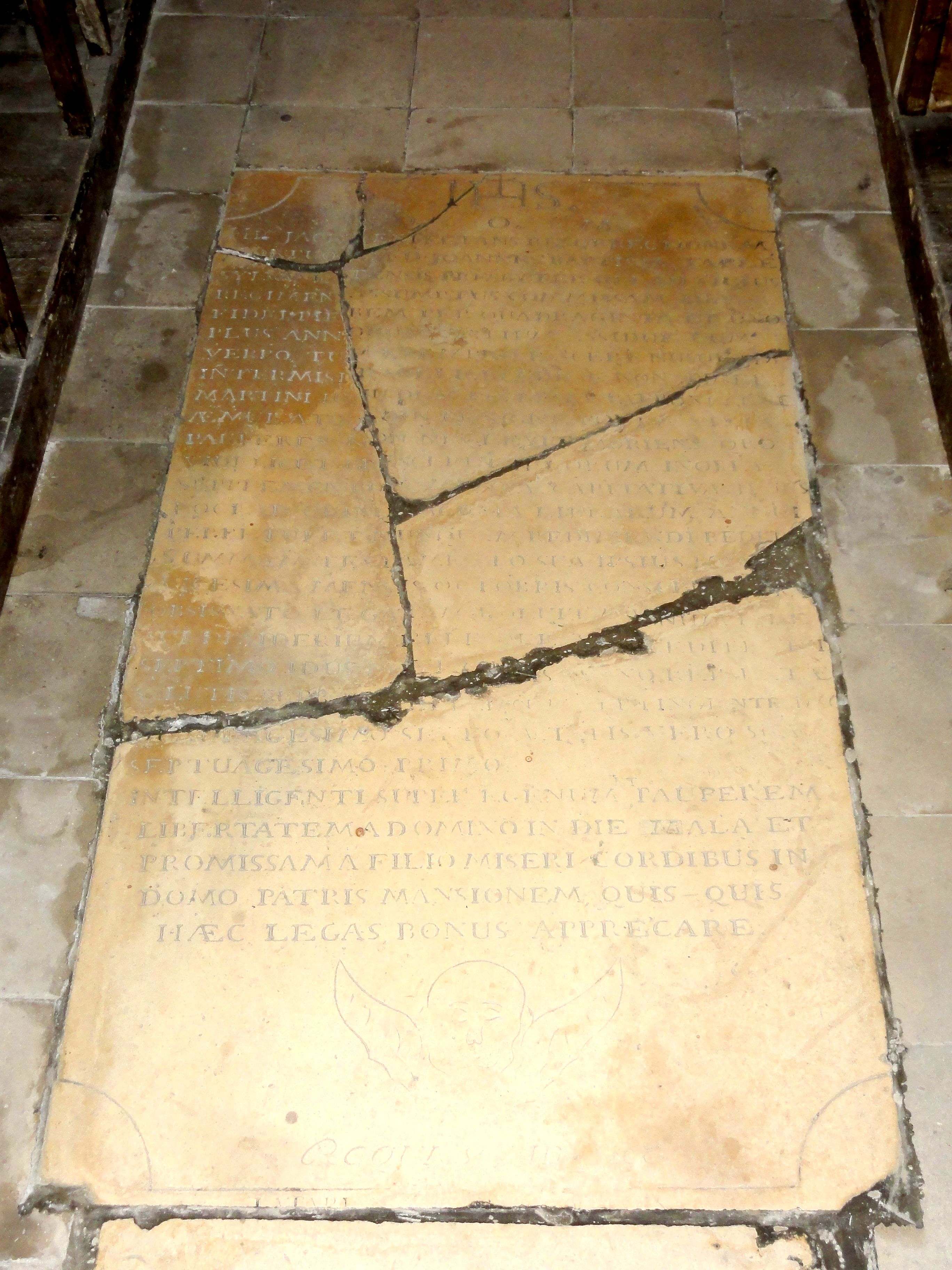 Nef, pierre tombale dans l'allée centrale : père Jean-Baptiste Tarlé, curé de Cinqueux de 1706 à 1746. Dimensions : hauteur 1,85 m ; largeur 1,00 m. Voir Amédée Beaudry, 1910, p. 32-33 et 47.